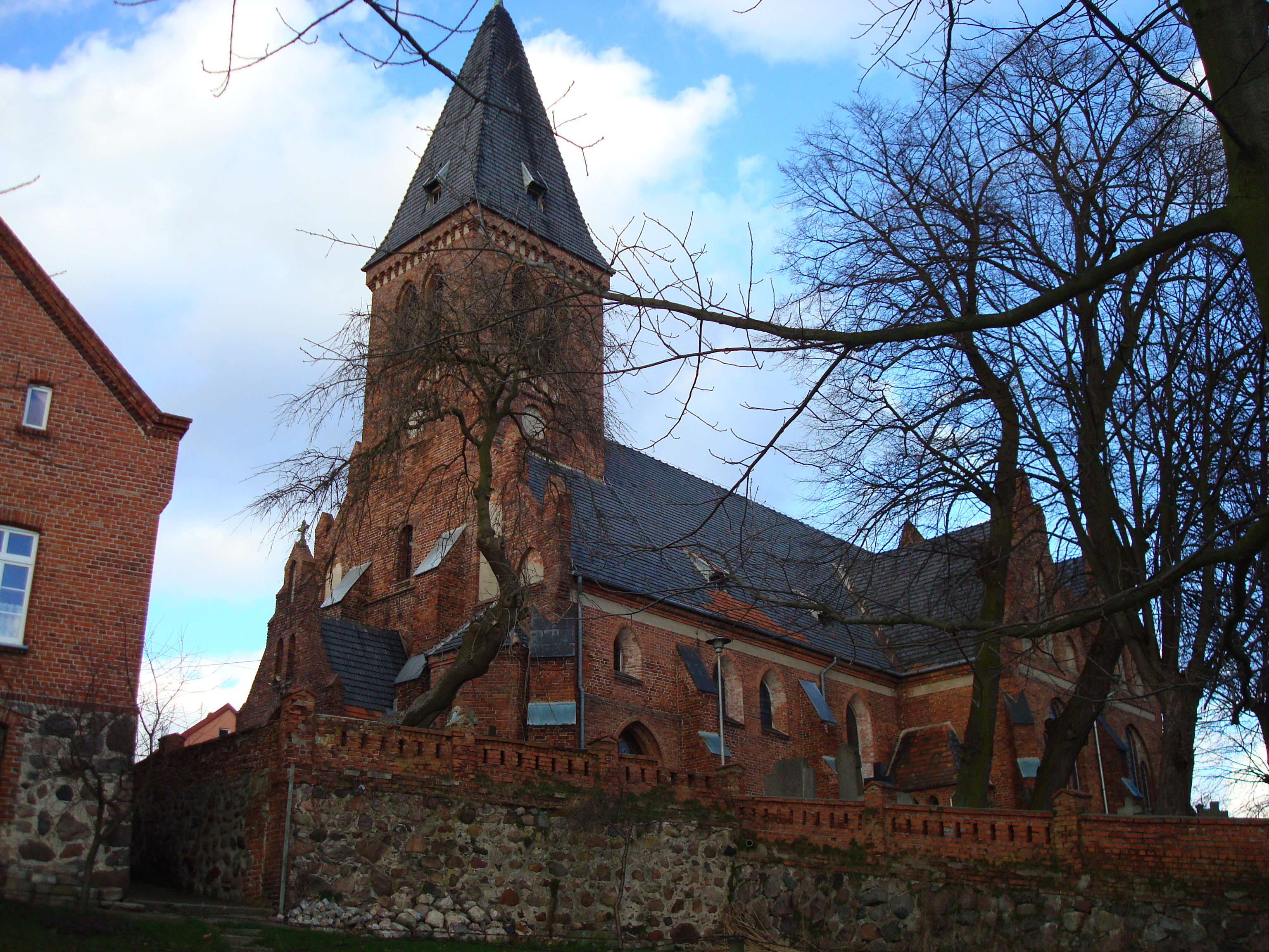 Sztum - rzymskokatolicki kościół parafialny p.w. św. Anny, 2 poł. XV, 1899-1901